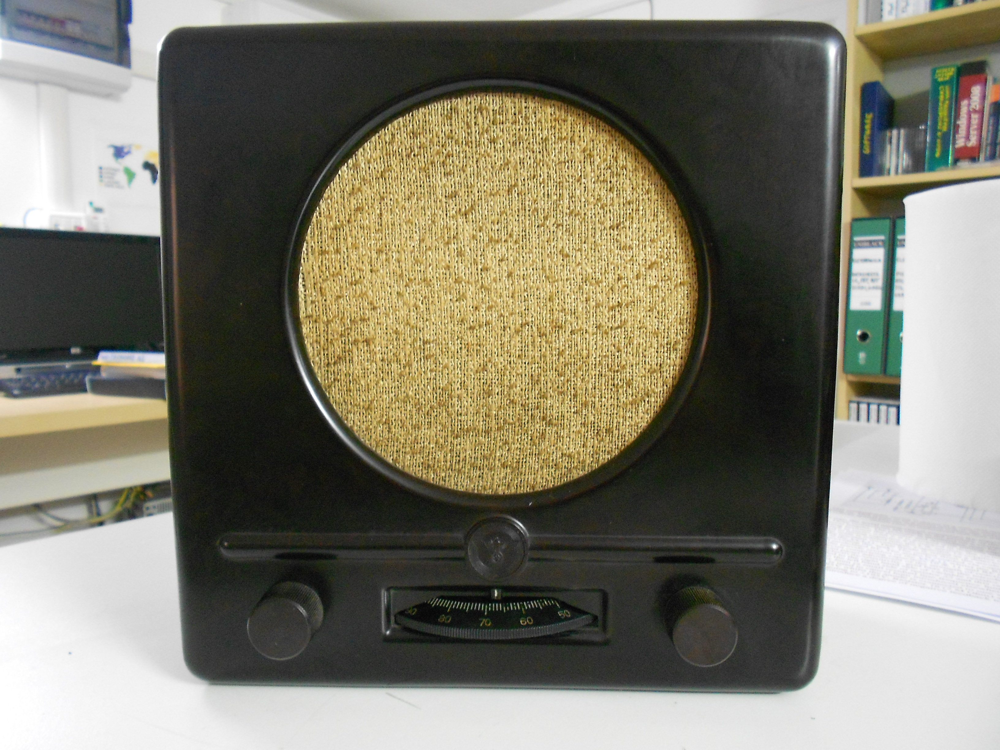 Vista frontale del DKE 38. Notare la ruota centrale per la sintonizazione delle stazioni, la manopola di sinistra serve per l'accoppiamento della bobina di sintonia, mentre la manopola di destra è l'innesco del circuito reattivo.